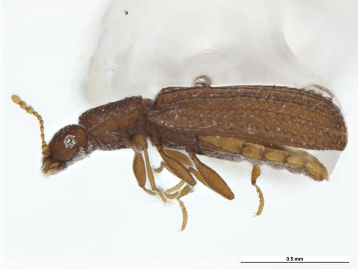 Dienerella beloni